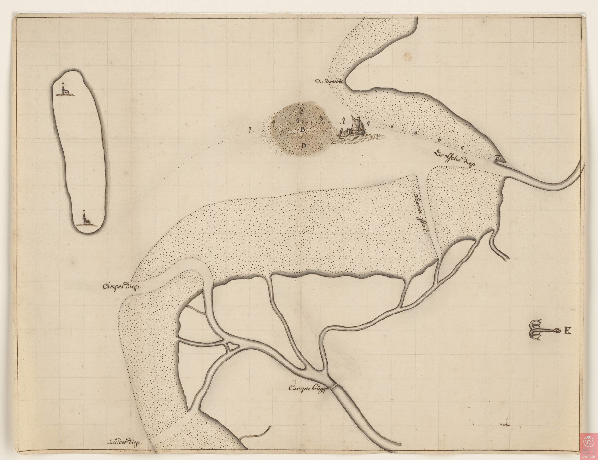 Kaart van het Kampereiland, Schokland en De Voorst bij Vollenhove, met de mondingen van de IJssel en het Zwarte Water, vervaardigd met het oog op de bebakening van het Zwolse Diep. Vermeld worden: Kamperdiep, Zuiderdiep, Heeren Stal en Kamperbrug. Het oosten is met een vierhakig anker aangegeven als E. Dit stuk hoort bij het Stadsarchief van Zwolle 1230-1813 (blok 700), inventarisnummer 5895. NL-ZlHCO_KD000274